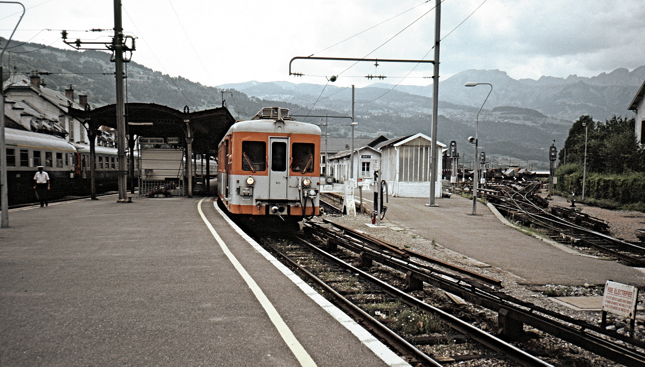 Gare du Fayet